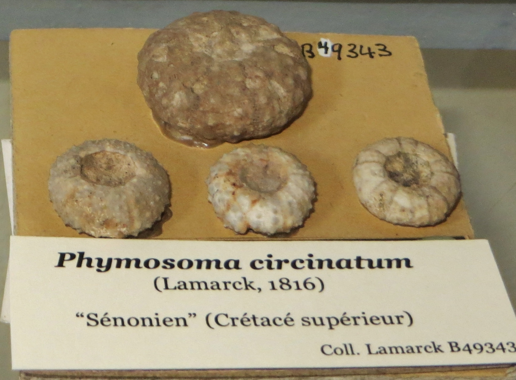 Fossile de Phymosoma circinatum (oursin disparu, MNHN).